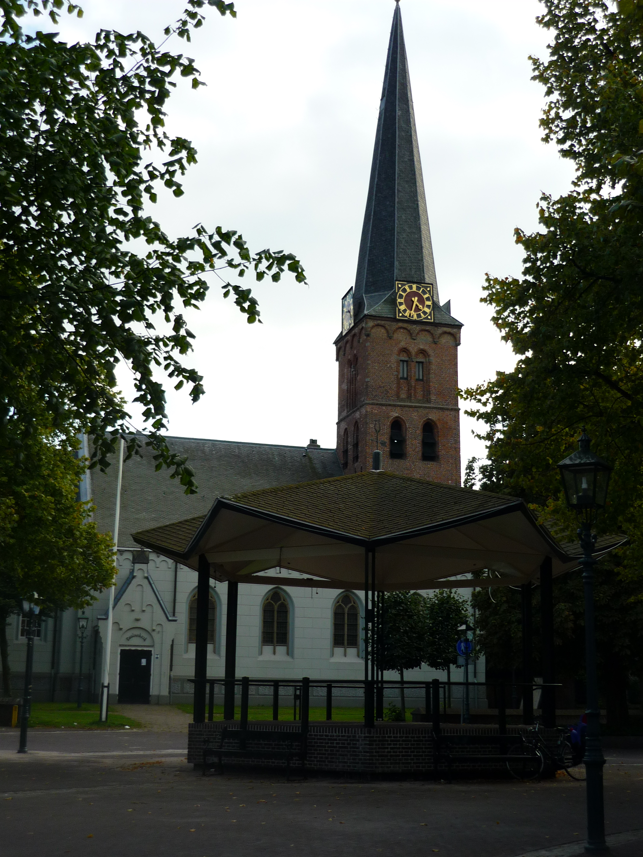 Overzicht plein de Brink in Baarn